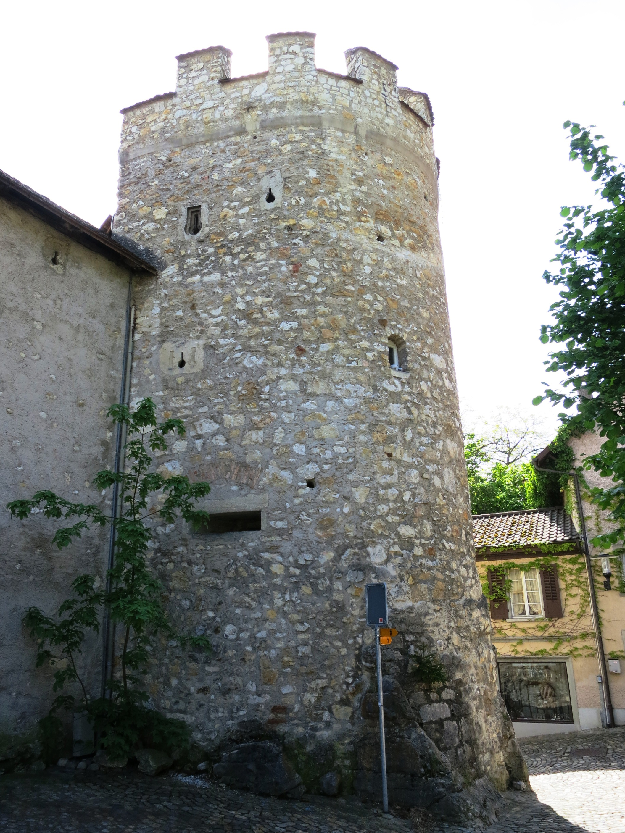 Farbturm, Brugg AG, Schweiz